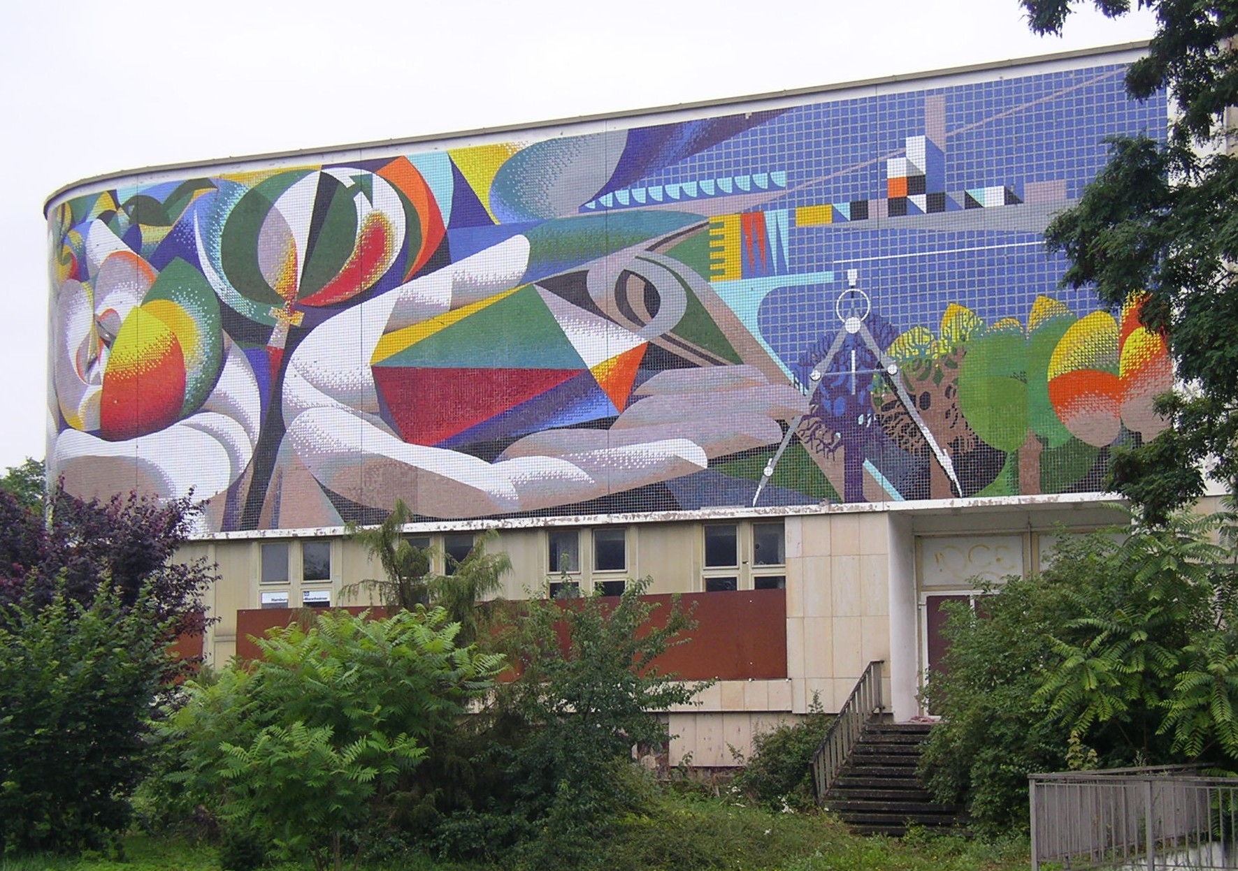 Wandbild "Die Beziehung des Menschen zu Natur und Technik" von Josep Renau (1907-1982) in Erfurt. Es befand sich am ehemaligen Kultur- und Freizeitzentrum im Wohngebiet Nordhäuser Straße und besteht aus 68.000 Glasfliesen . Das Mosaik steht unter Denkmalschutz, daher wurde es beim Abriß des Gebäudes eingelagert. Es war die letzte große Arbeit von Josep Renau.